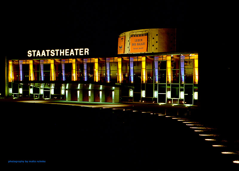 Staatstheater Kassel bei Nacht Quelle: kasselgalerie.de (selbst fotografiert) Fotograf: MalteRuhnke